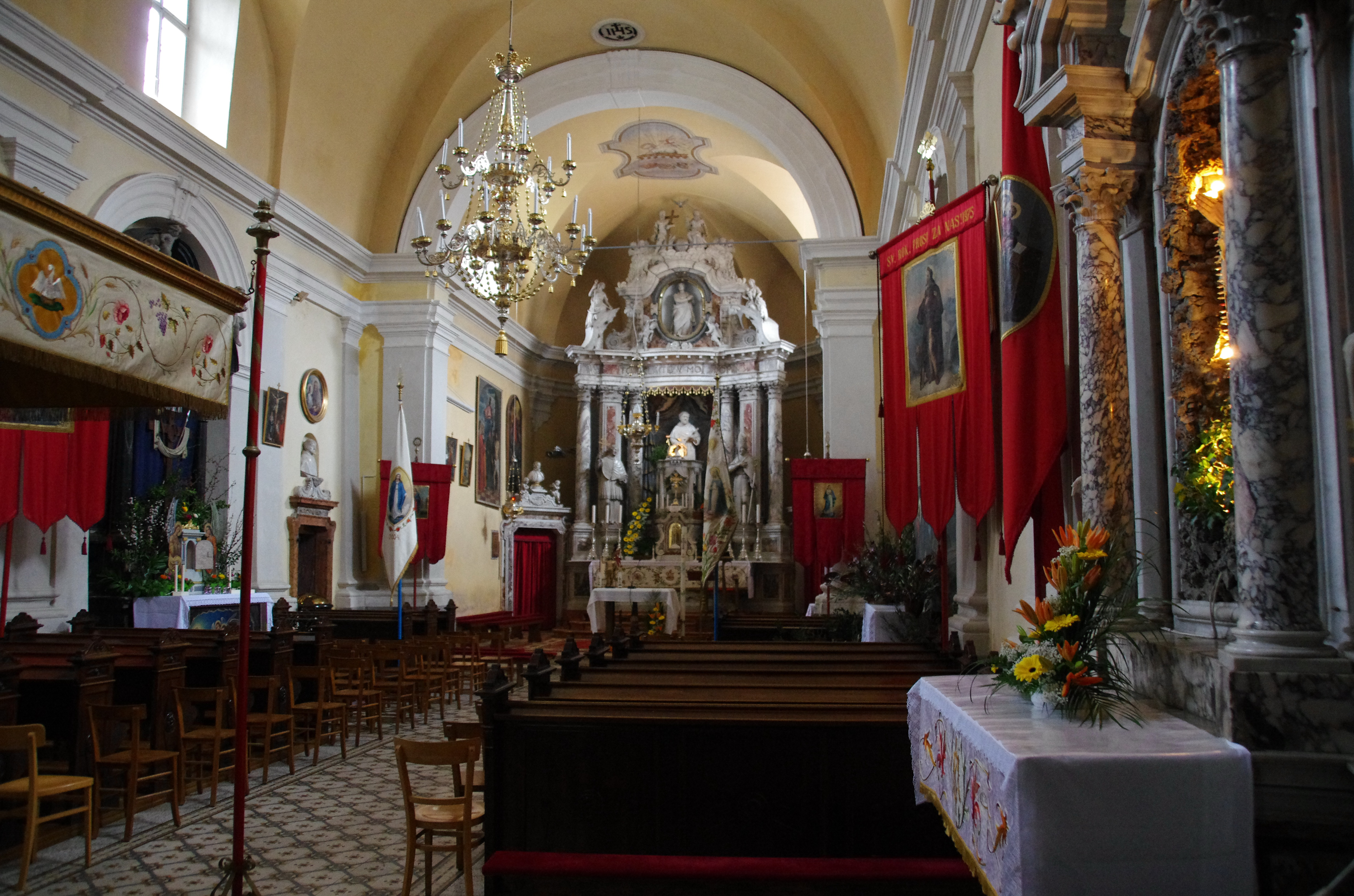 Ajdovščina church